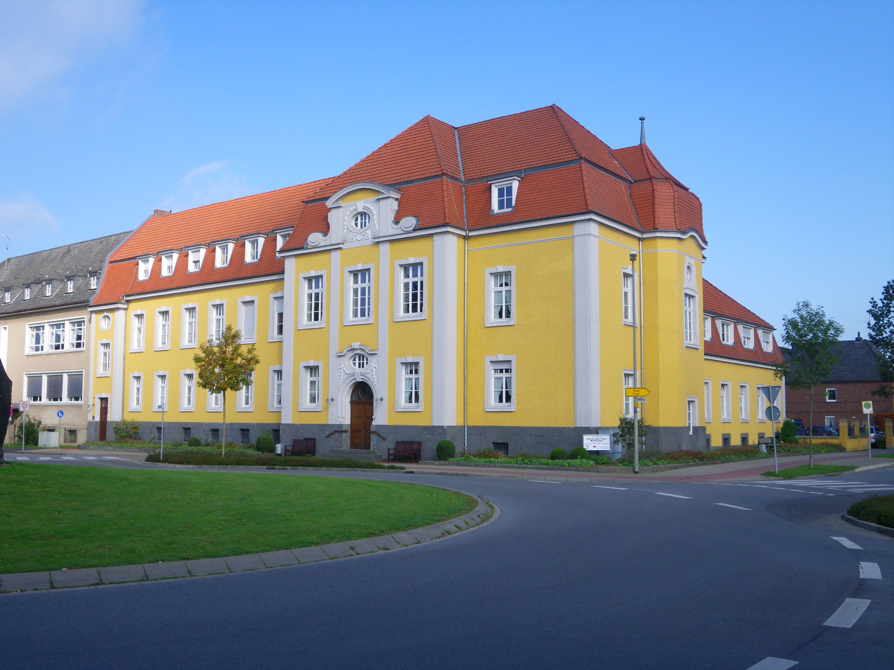 Denkmalgeschütztes Altes Amtsgericht Erstellung: Anf. 19. Jahrhundert Ortslage: Rees, Sahlerstraße / Empeler Straße